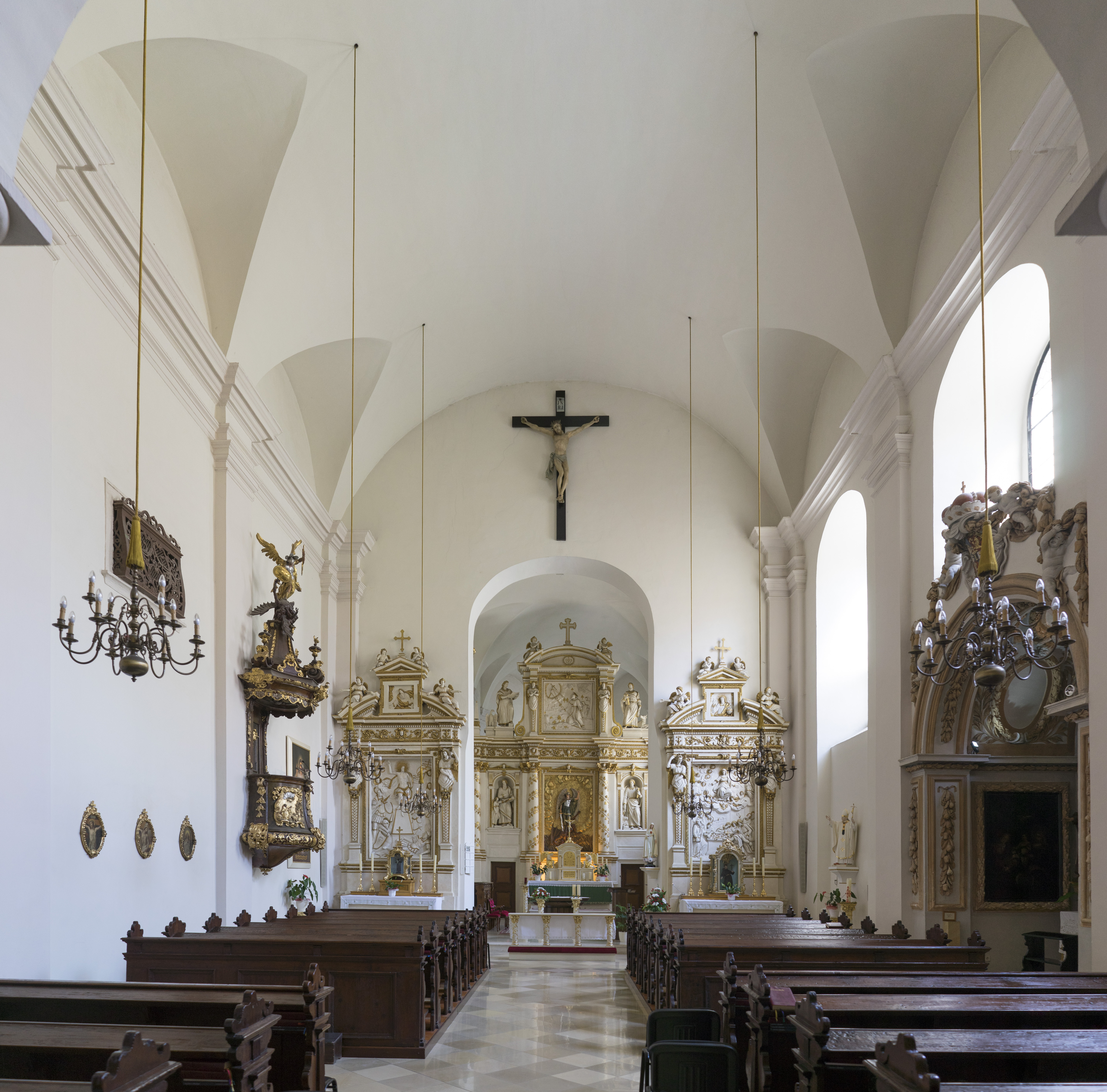 Franziskanerkirche innen, Eisenstadt